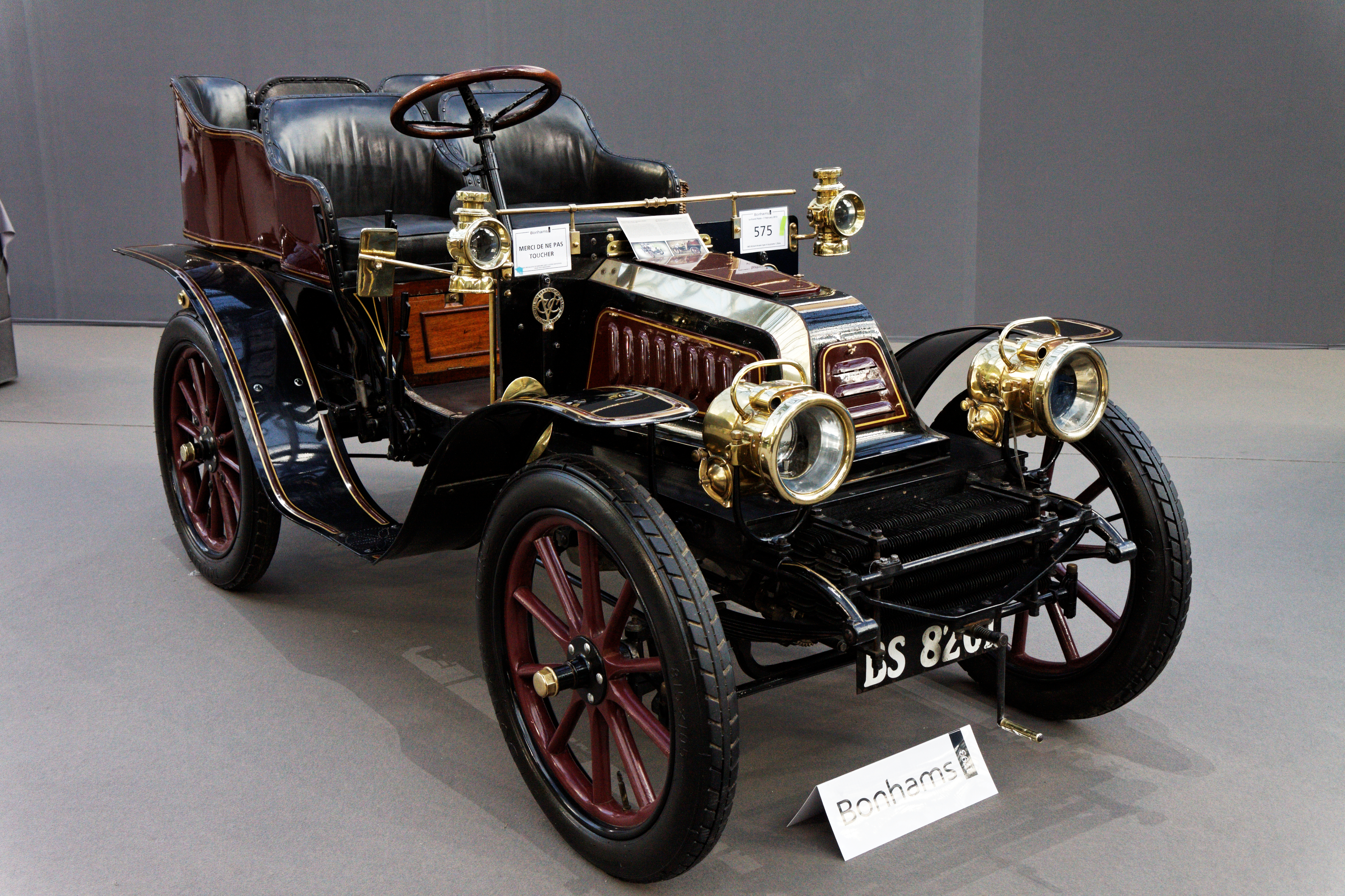 Une Richard-Brasier type H bicylindre 1.7 litre carrosserie tonneau de 1903.